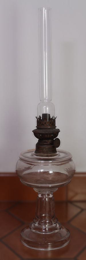 Lampe à pétrole à bec Kosmos avec verre étranglé Taille 8 (lignes) / Verre diamètre 36 mm, hauteur 232 mm / Mèche 43 mm Lampe originale de la 1re moitié du 20e siècle